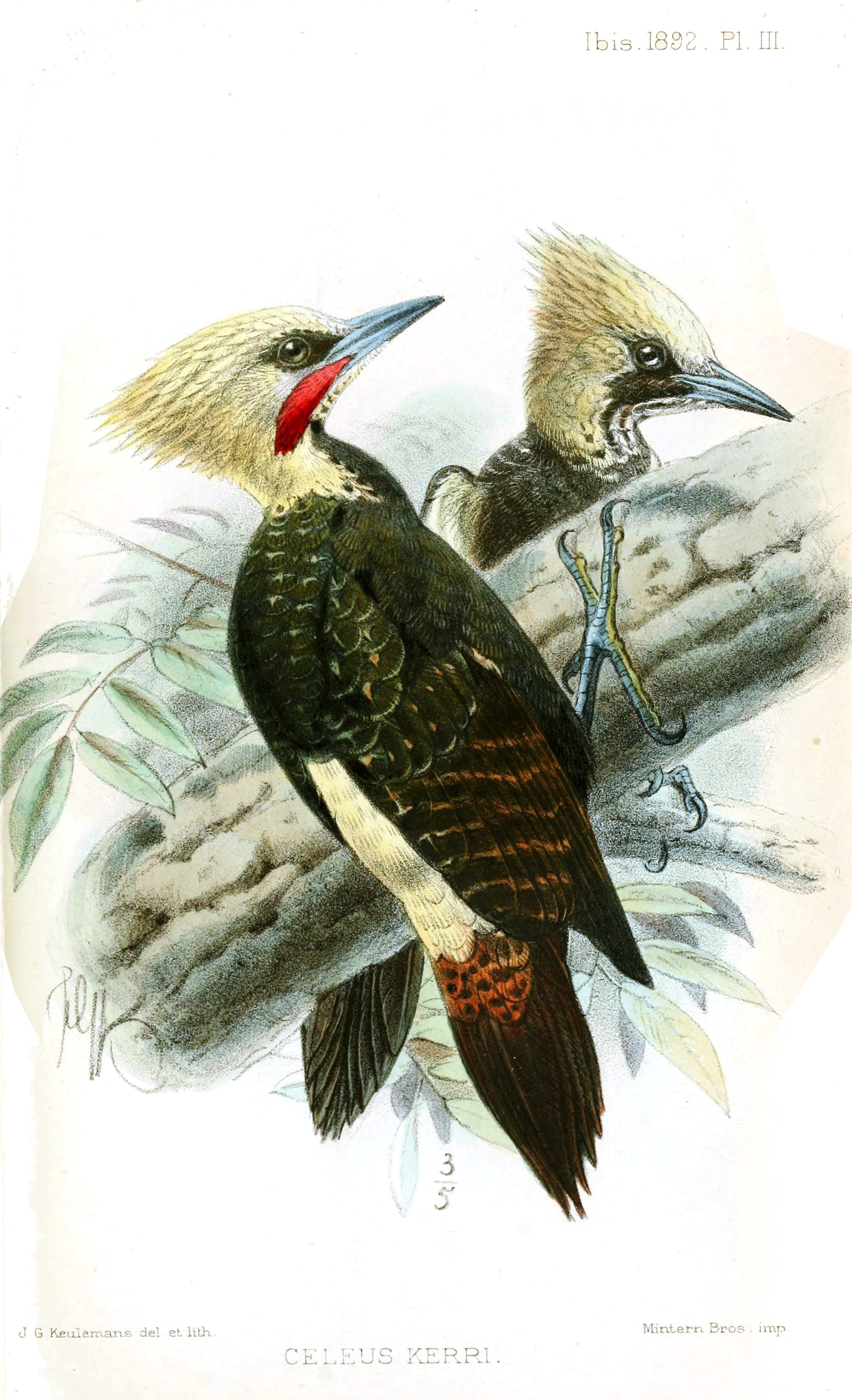 Celeus lugubris kerri